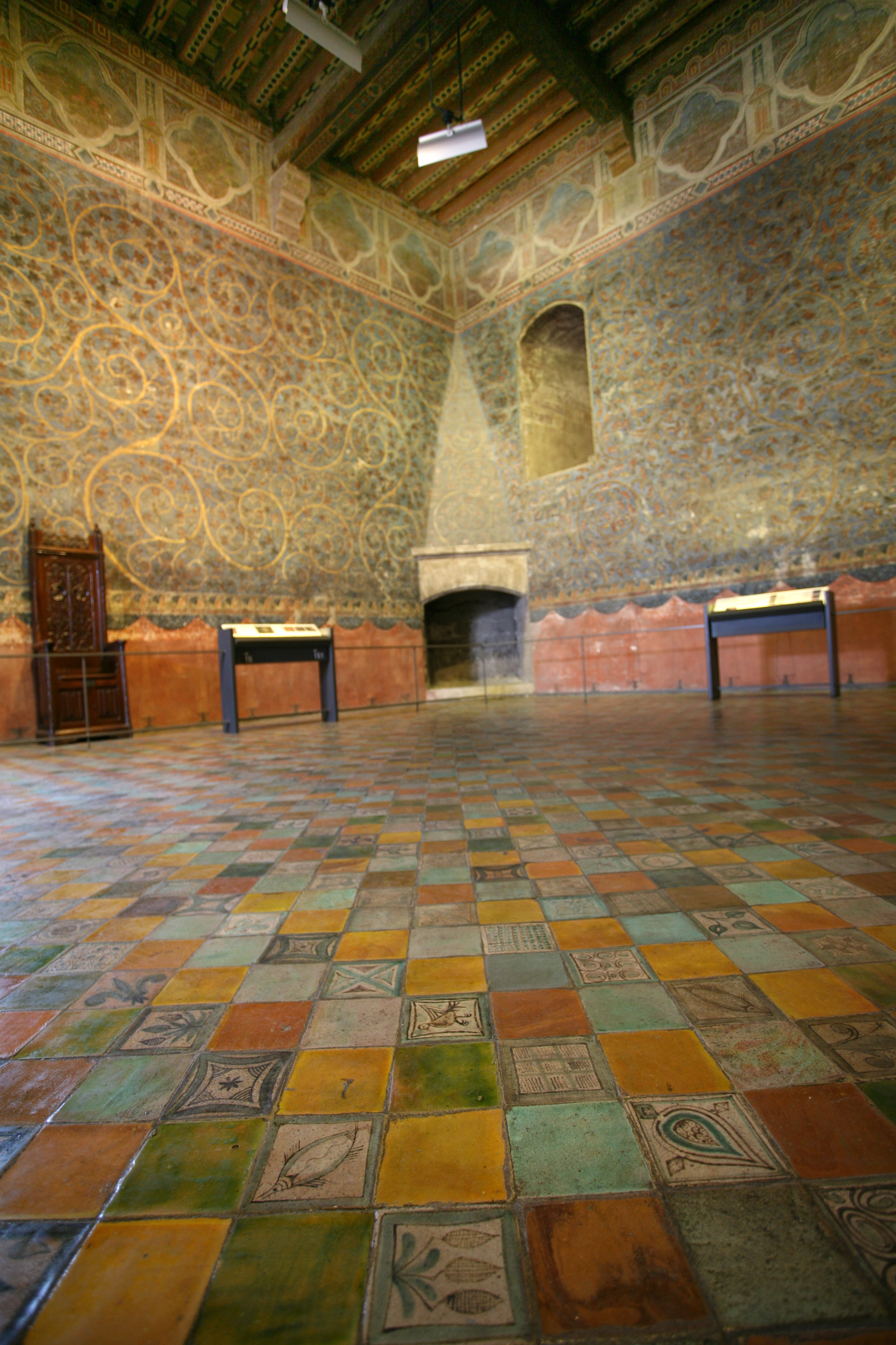 la "Chambre du Pape", Palais des Papes, Avignon, Vaucluse, France